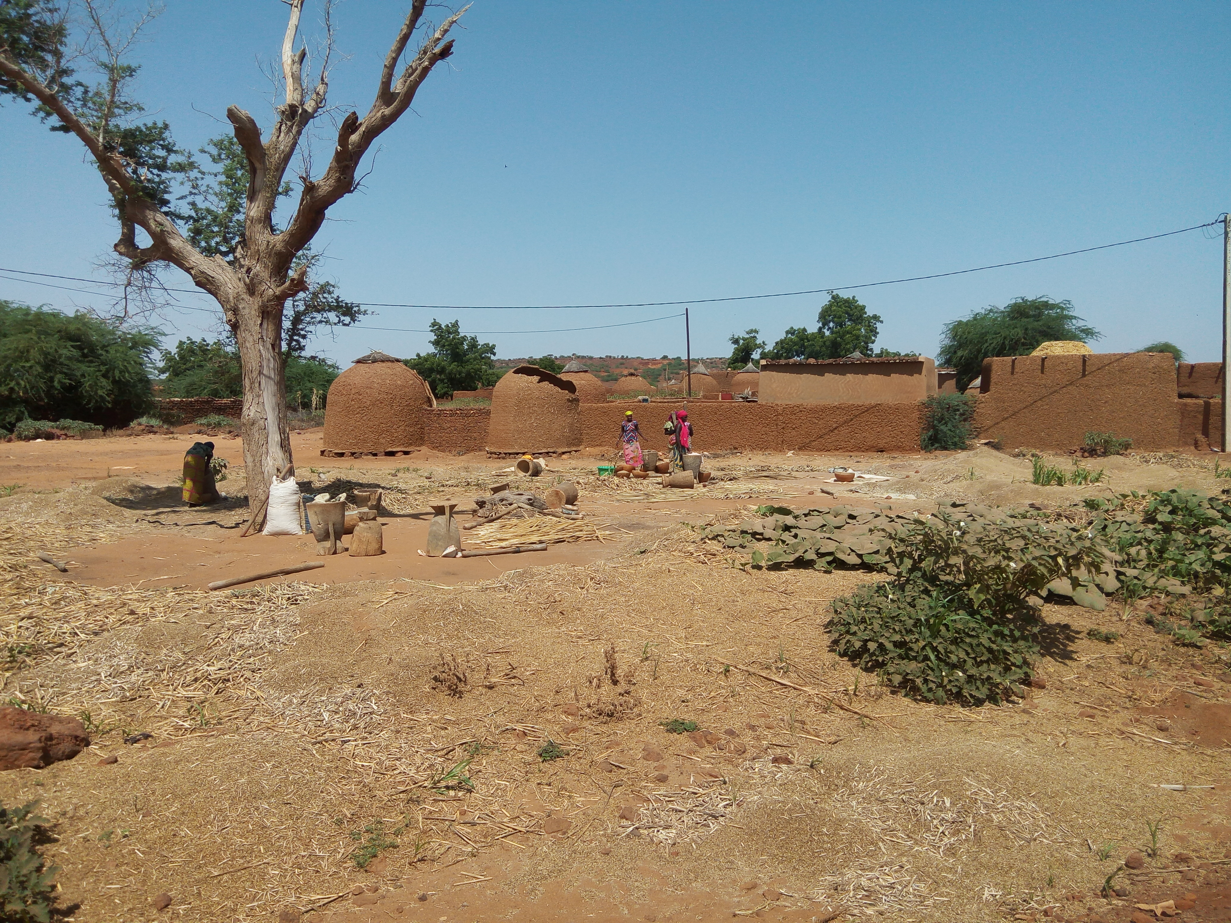 c'est une photo des femmes rurales (village de Founkouye/Région de Tahoua en république du Niger) entrain de battre du mil dans le cadre des activités ménageres. This is an image of music and dance from Niger